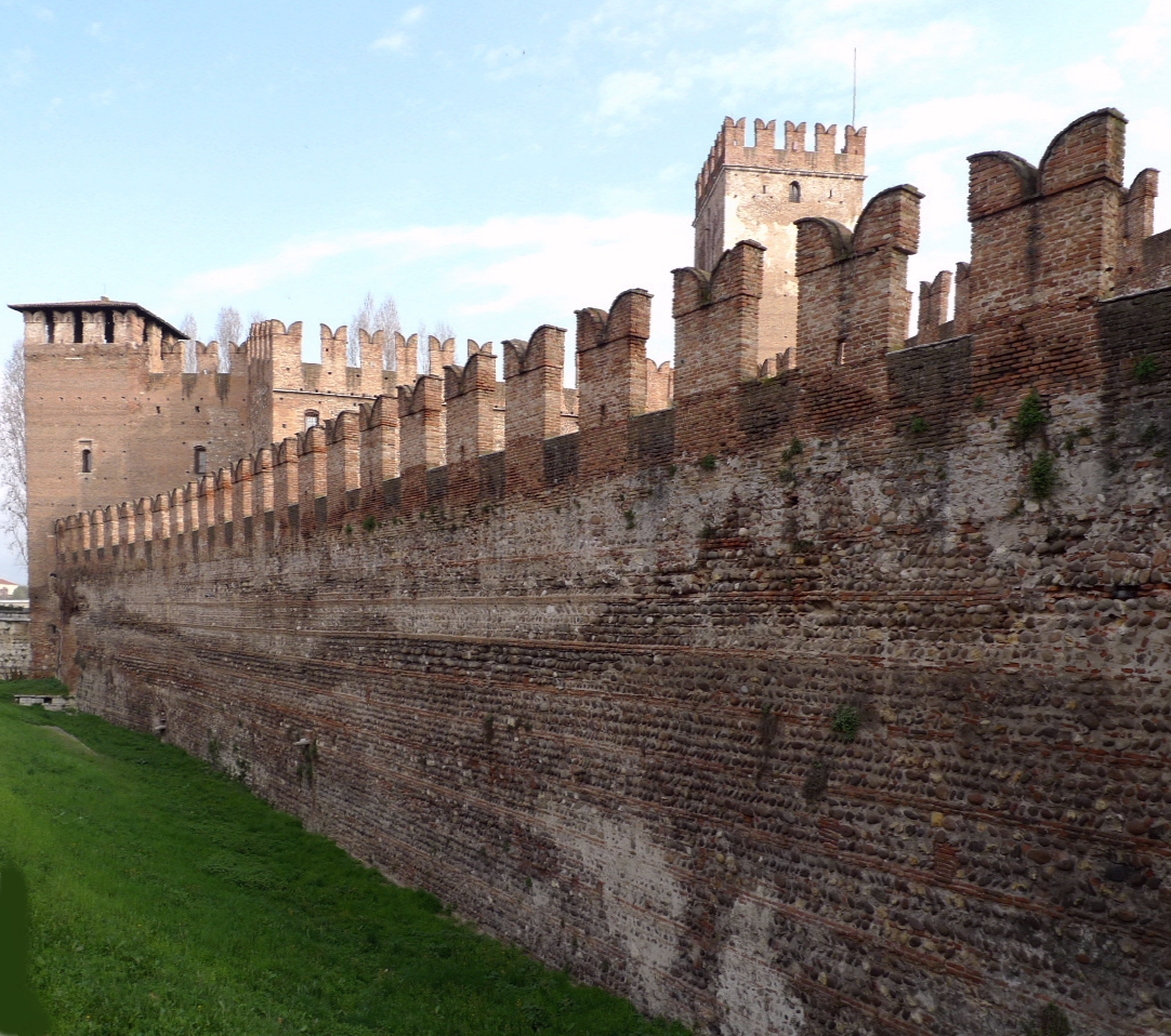 Castelvecchio (Verona)